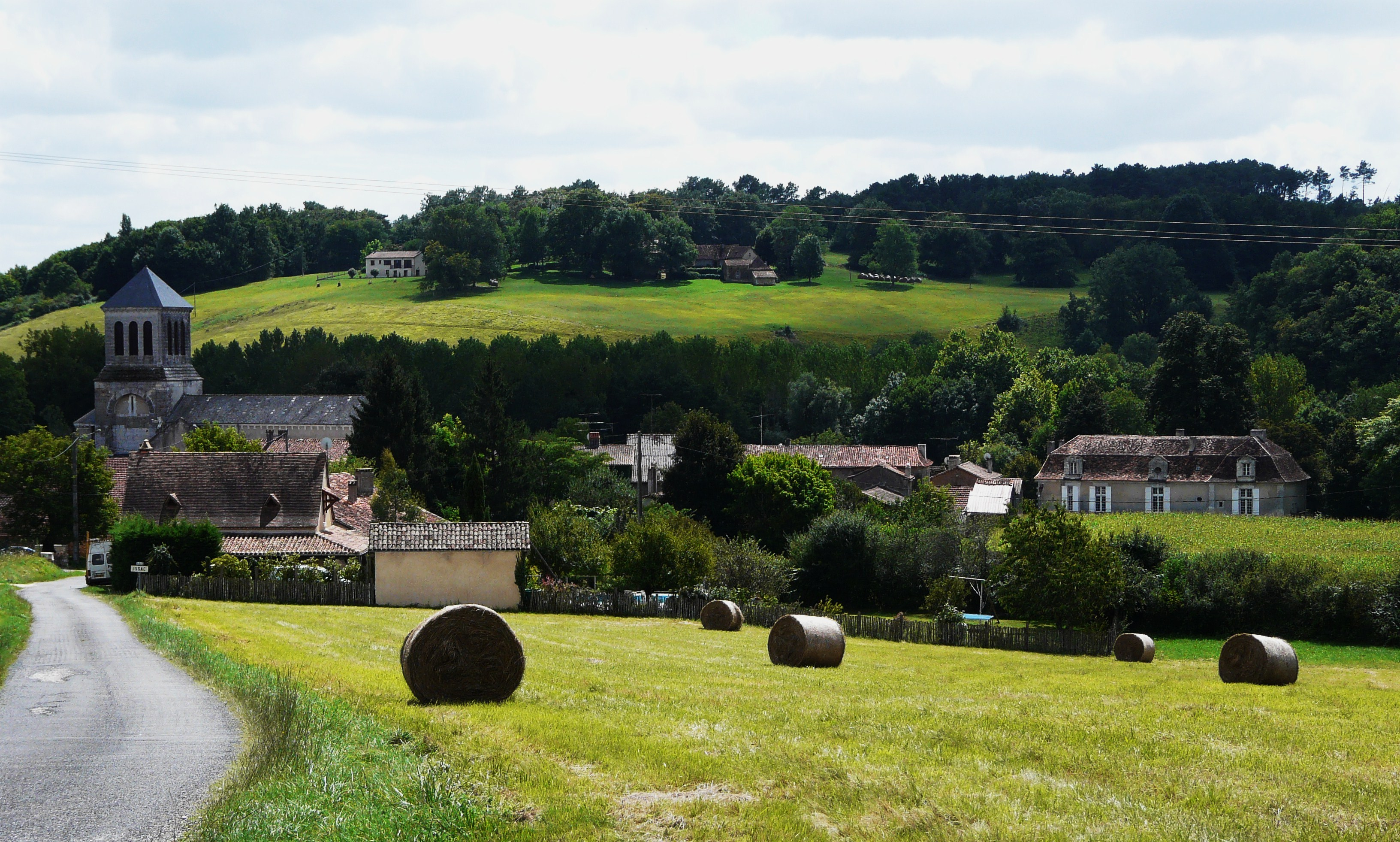 Le village d'Issac